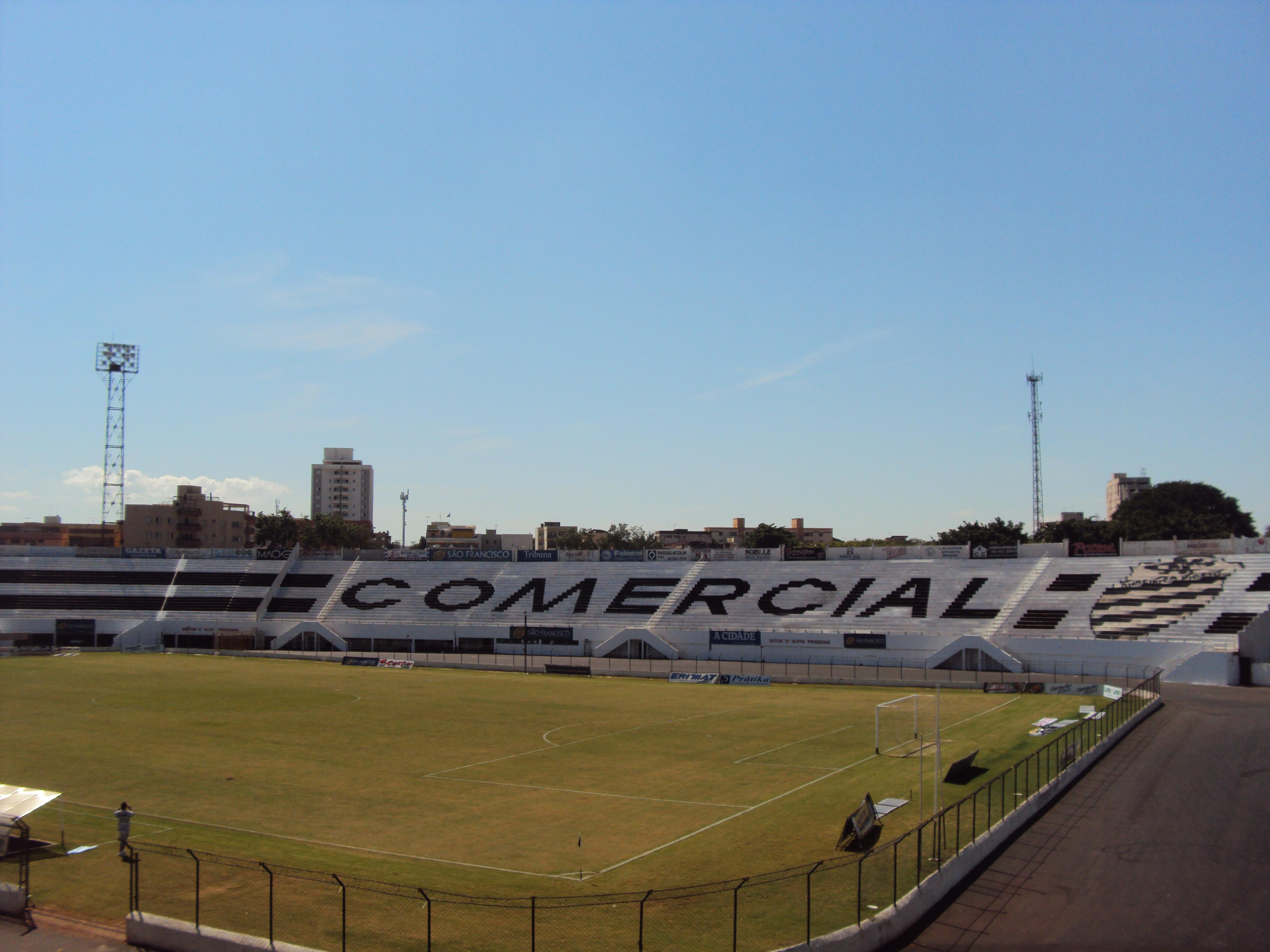 Estádio Palma Travassos - Coliseu do Jd. Paulista